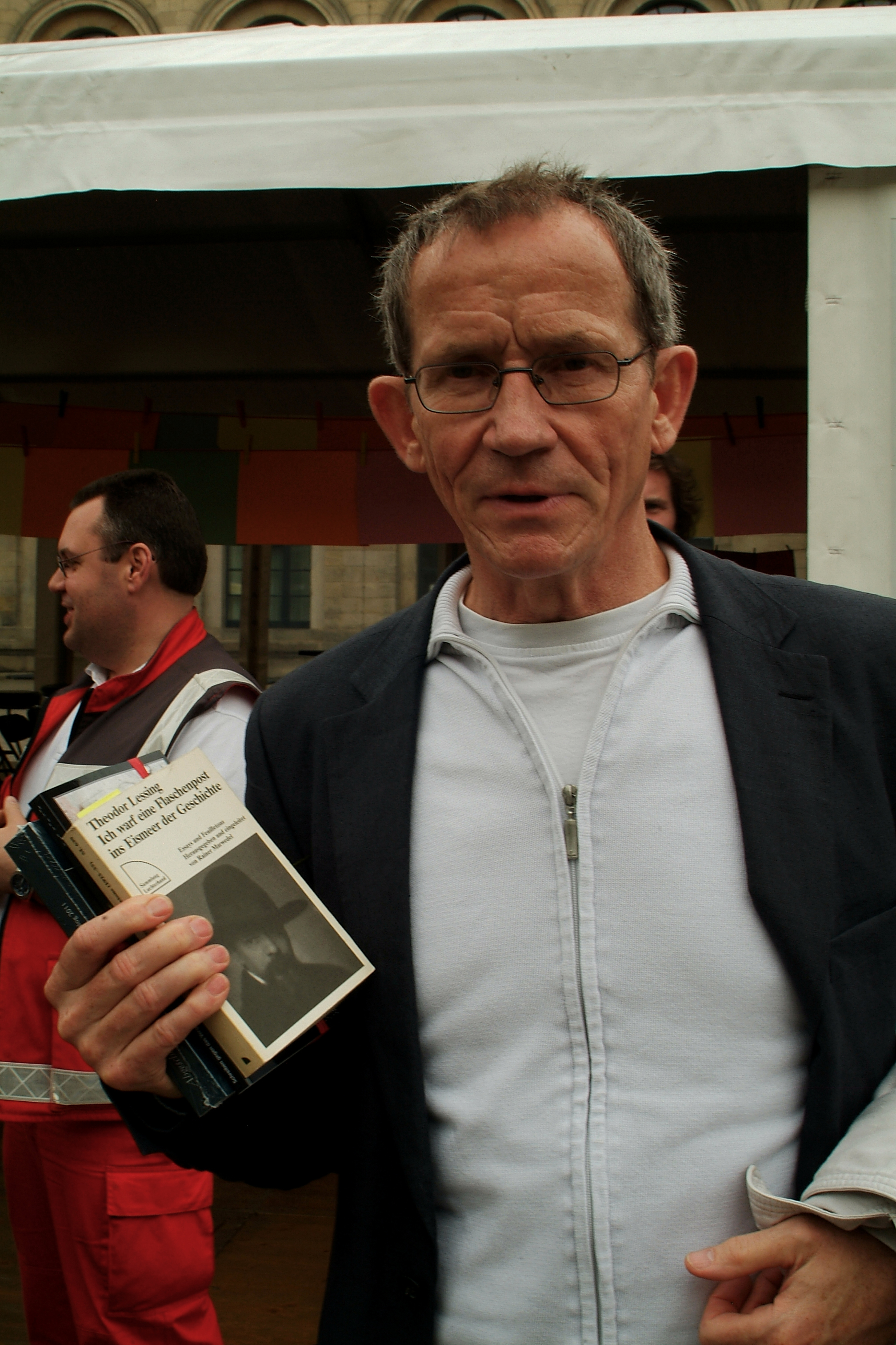 Gedenkveranstaltung zum 79. Jahrestag der Bücherverbrennungen in Hannover. Unter der Erkenntnis "... dort, wo man Bücher verbrennt, verbrennt man am Ende auch Menschen" fanden durch die Inititative "Hannover im Wort" verschiedene Veranstaltungen statt, darunter die am Opernplatz mit Lesungen verfolgter Autoren bzw. von Ihnen verbrannter Bücher.